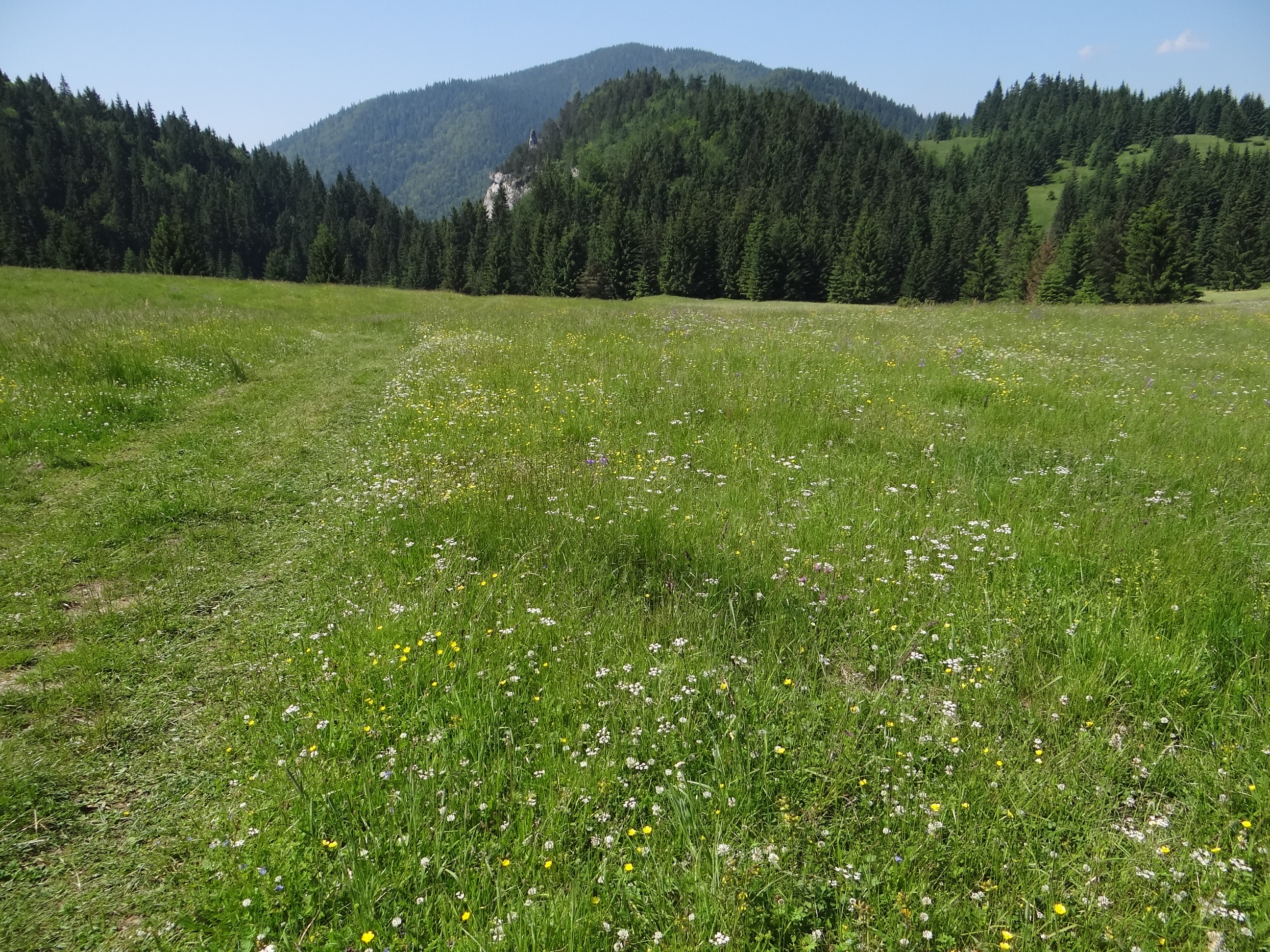 Svorad. W dole dolina Prosiecka, u góry Łomy